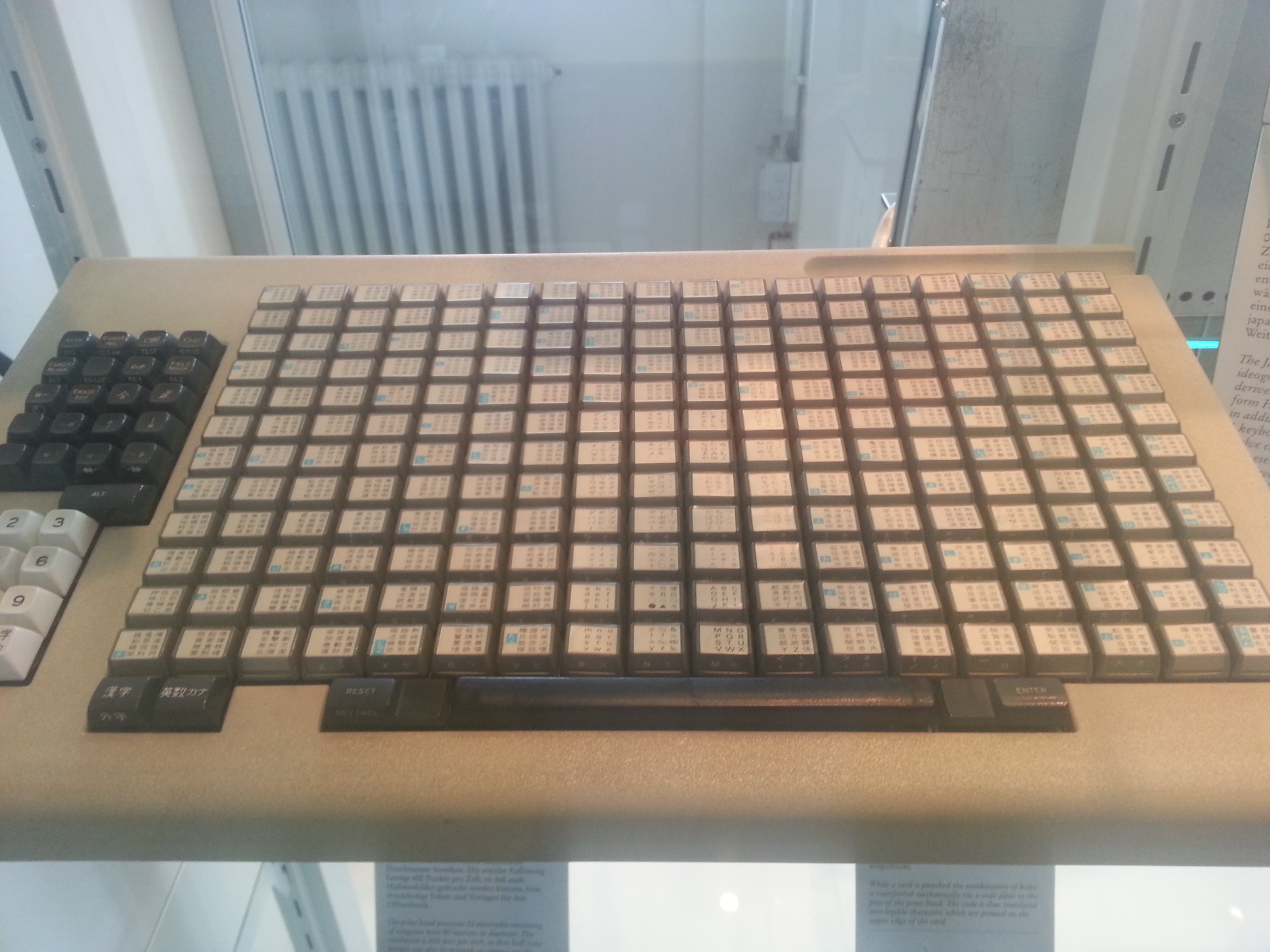 Exhibit from Deutsches Museum München